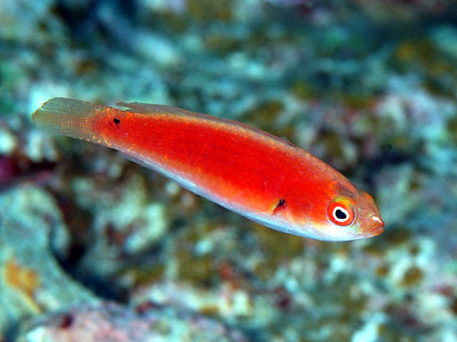 ゴシキイトヒキベラ Cirrhilabrus katherinae